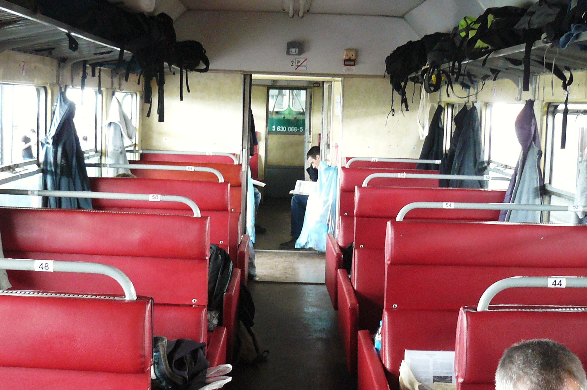 SU45-115 z pociągiem specjalnym "Dolnośląskie Zakamarki" (25.4.2015r.). Wagon typu 120A w składzie (Legnica).